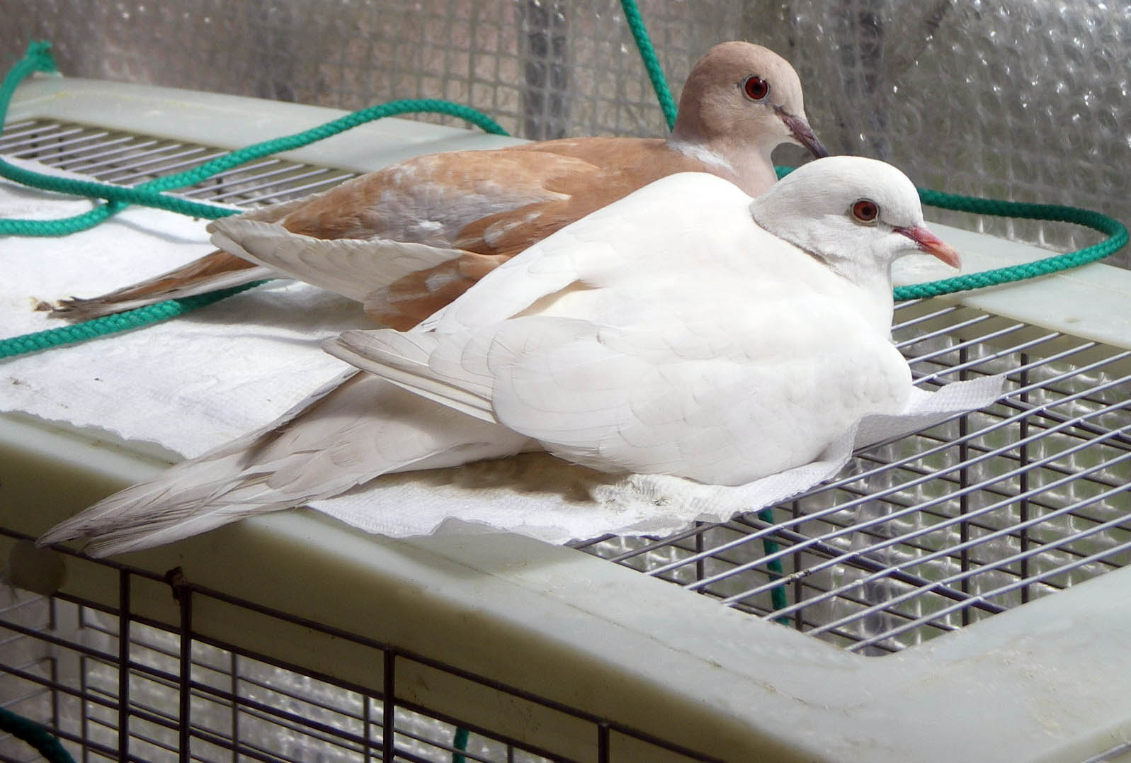 Dos tórtolas domésticas (streptopelia risoria)